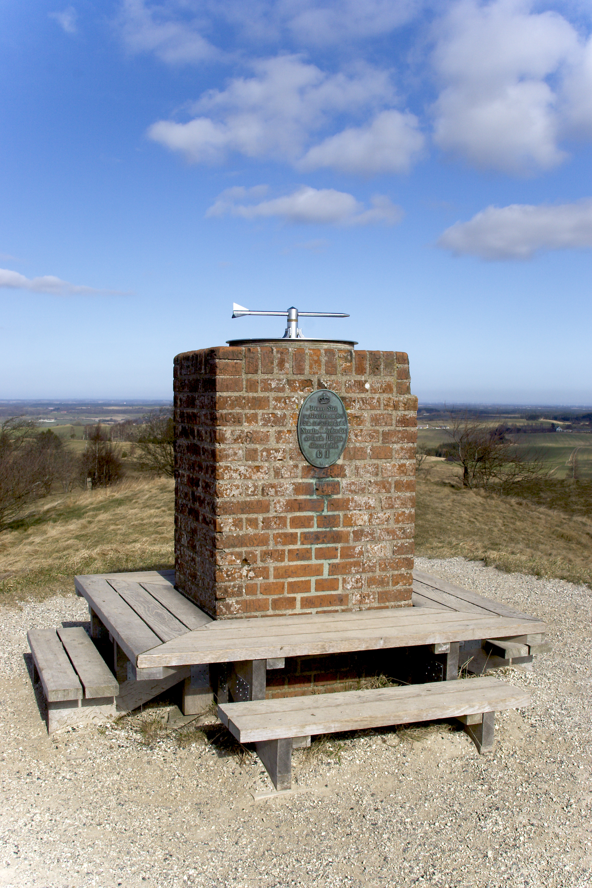 Postament på Agri Baunehøj, ommuret postament, nu som udsigtsplatform med pil der viser punkter i landskabet